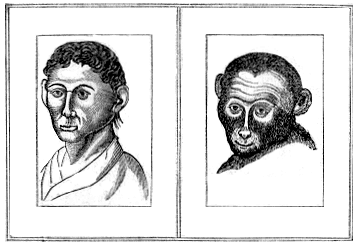 Physiognomischer Vergleich zwischen Mann und Affe, 1841